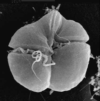 Karenia brevis (Davis) G. Hansen et Moestrup 2000 (Gymnodinium breve Davis, 1948; Ptychodiscus brevis (Davis) Steidinger 1979)